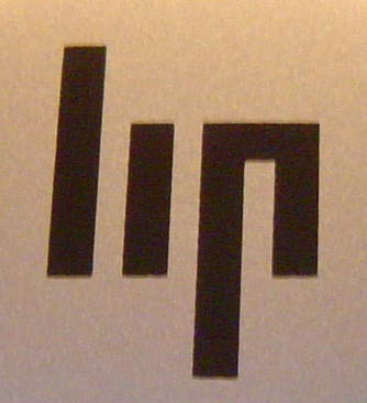 Logo Lip